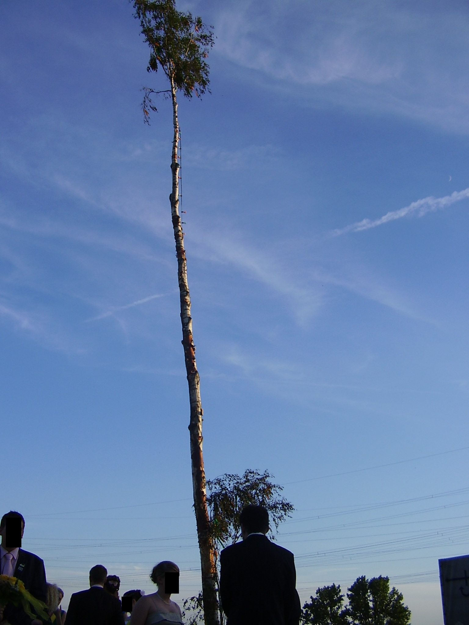 Maibaum vorm Scherberger Zelt 2007